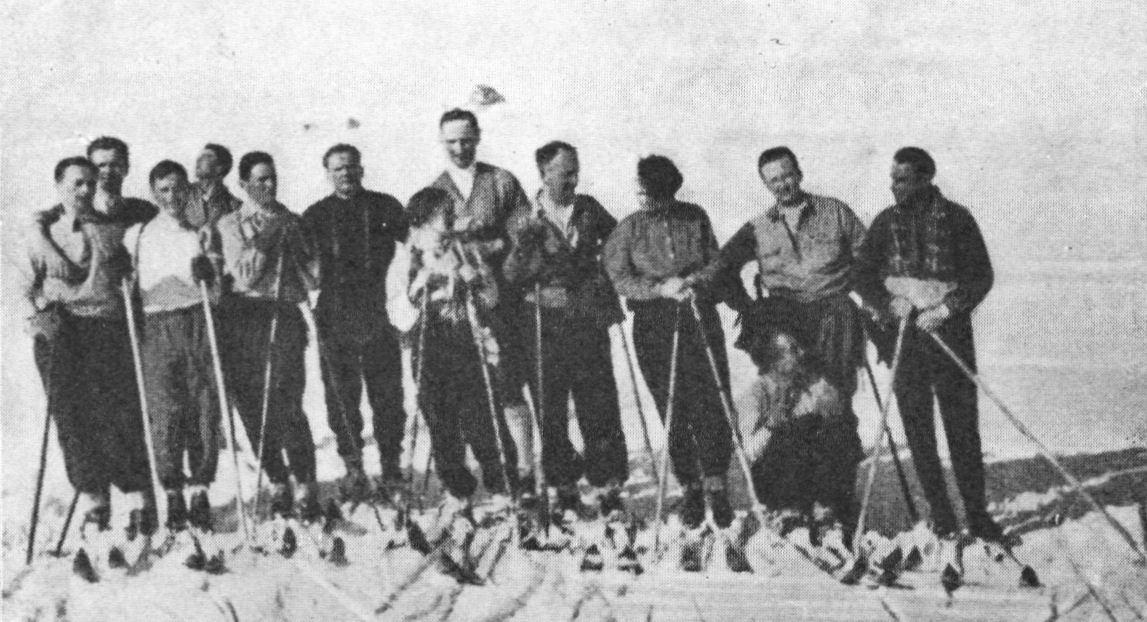 6 Pułk Lotniczy kurs narciarski.